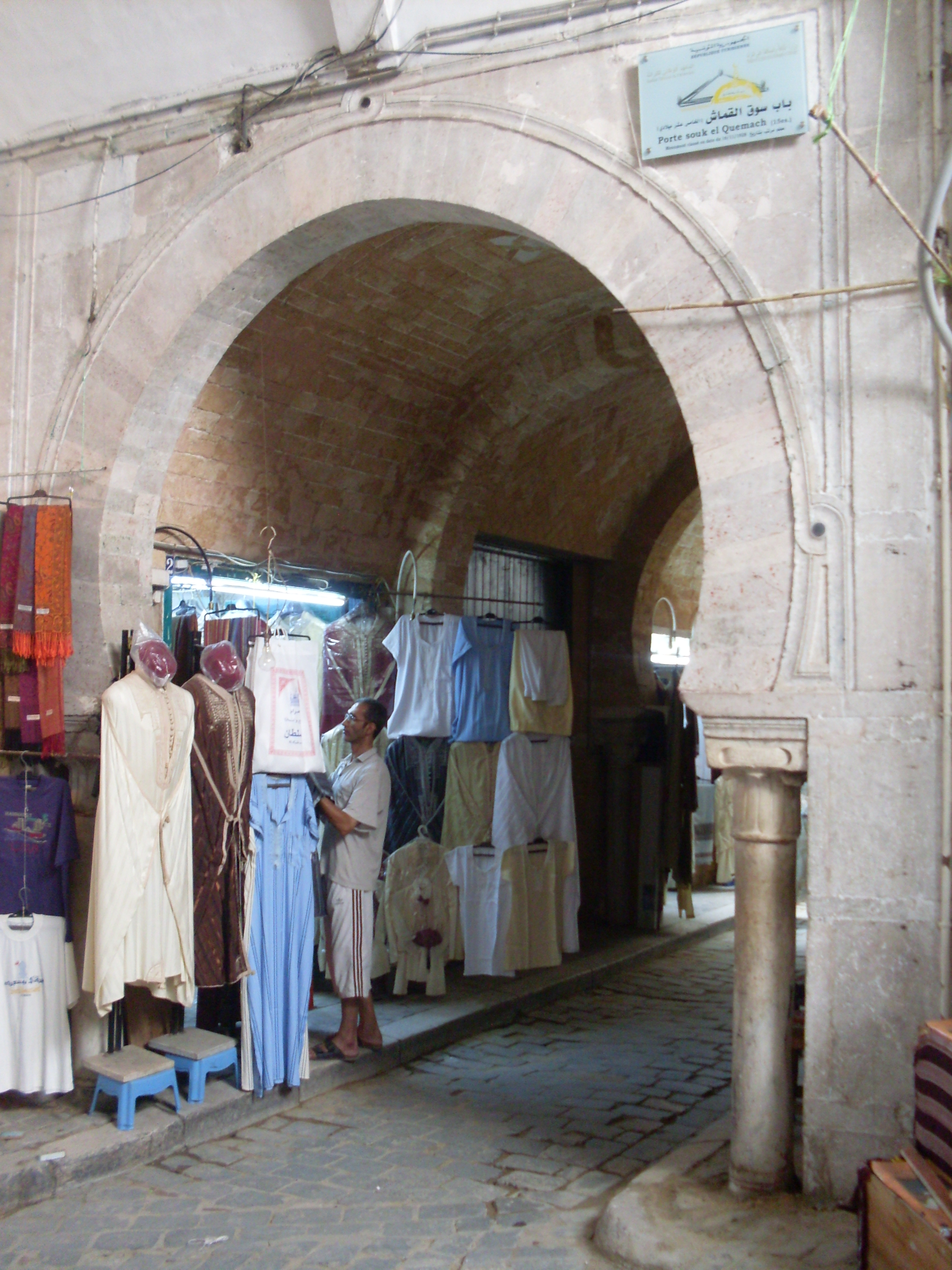 Medina Bab Souk Lakmech